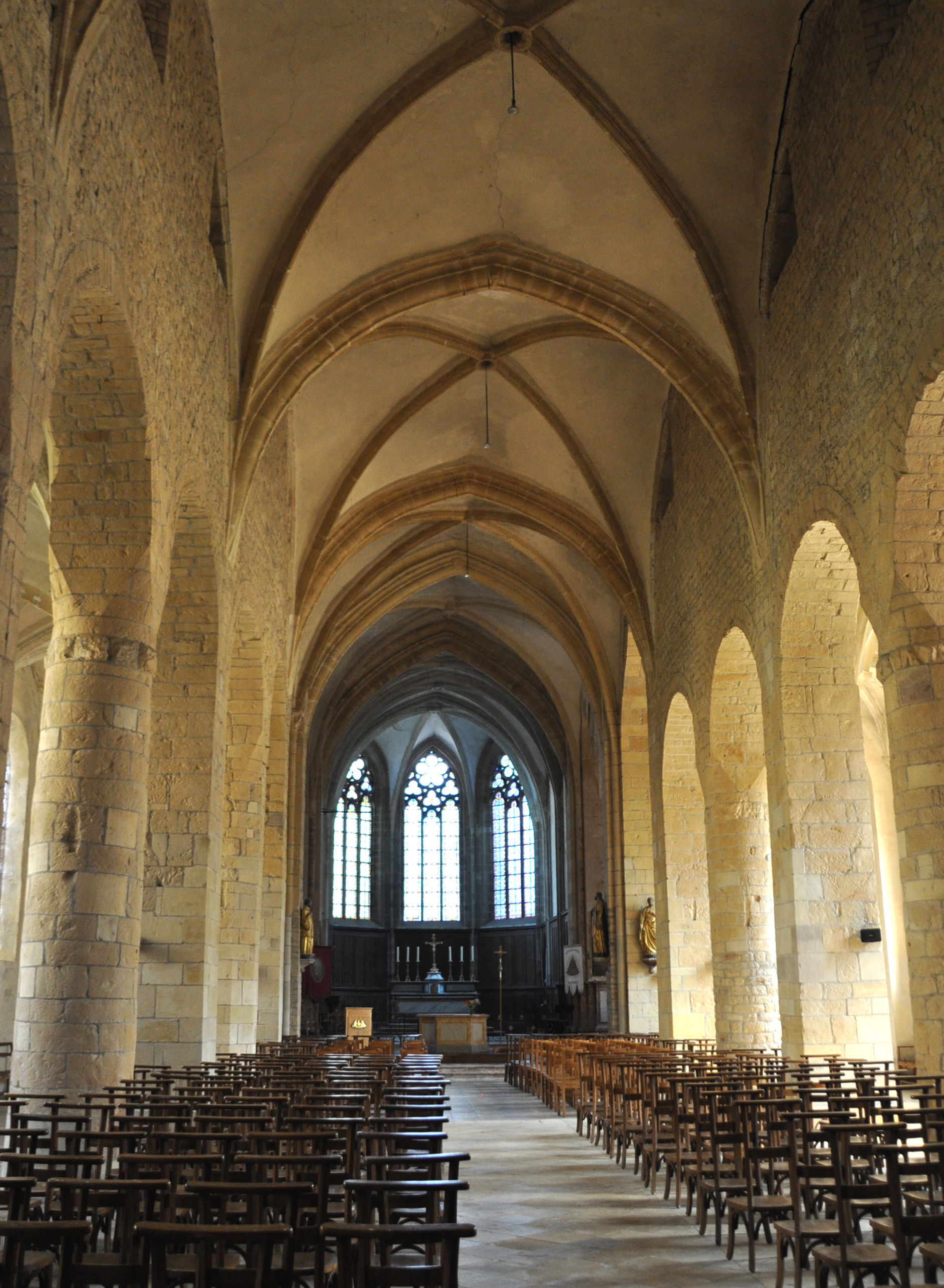 Faverney (Haute-Saône) - Abbaye .